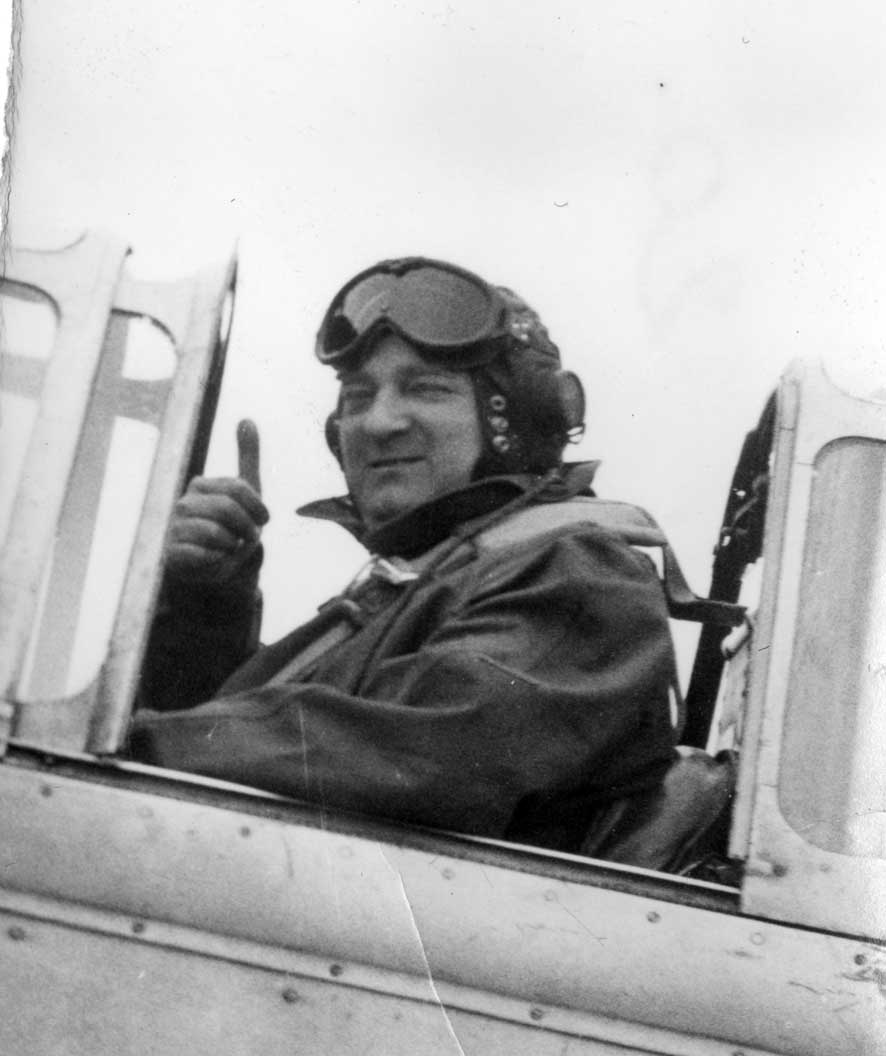 Pierre Voisin, grand reporter au Figaro.